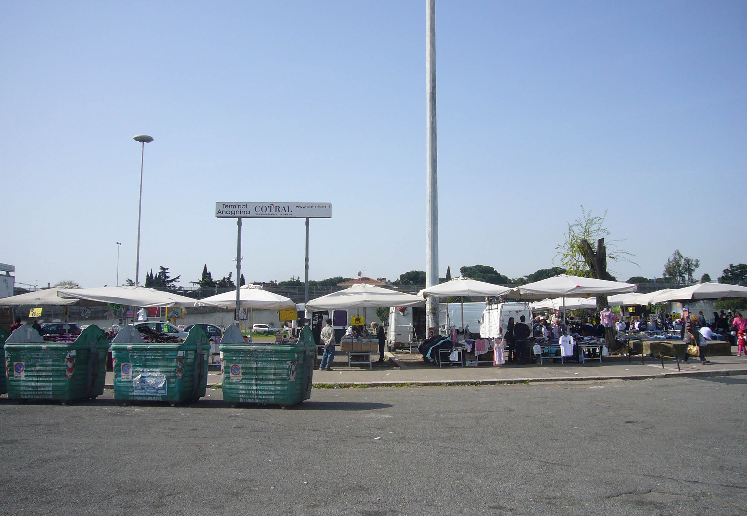 Roma, Municipio X, Metro A Anagnina - attestamento COTRAL, capolinea ATAC e mercatino